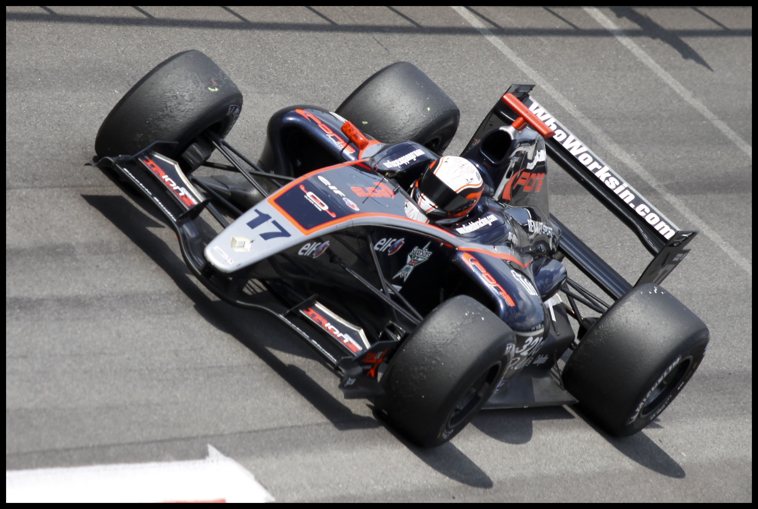 Formula Renault 3.5 Series